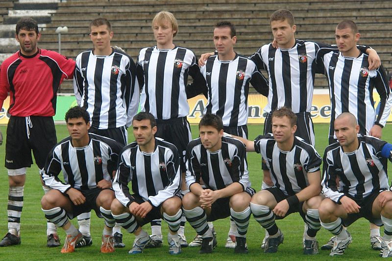 Локомотив Пловдив - Левски София, 19 март 2008 г. Източник : [1] Автор : Стоян Грозлеков.